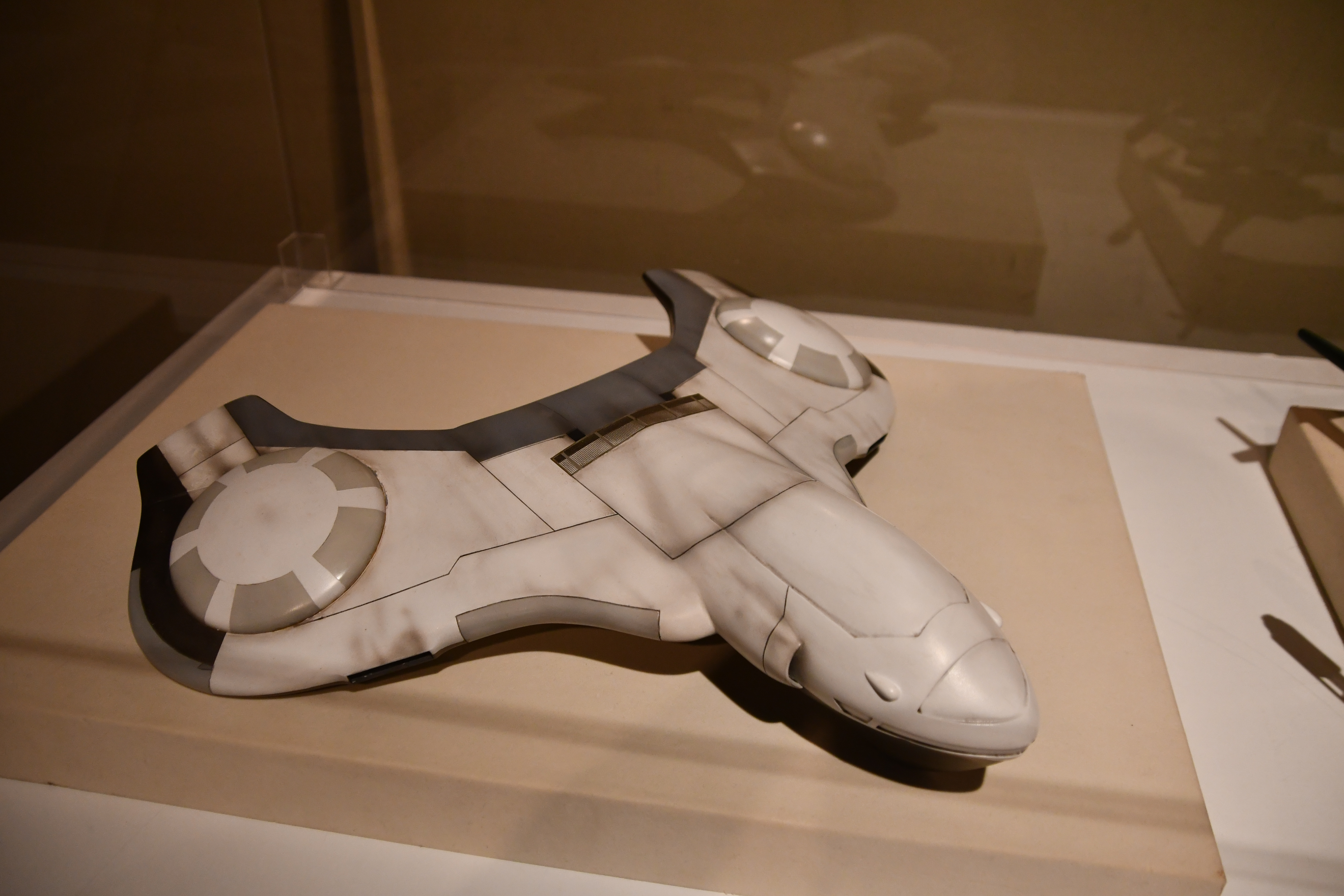 映画「ゴジラVSキングギドラ」に登場するタイムマシン”KIDS” 模型 右前面。2018年7月29日 明石市立文化博物館で開催された「特撮のDNA展」にて。